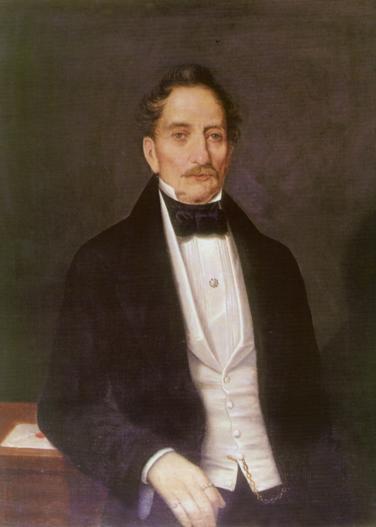 Portretul lui Ion Lecca, a fost soțul Eufrosinei Lecca. Muzeul Național de Artă al României